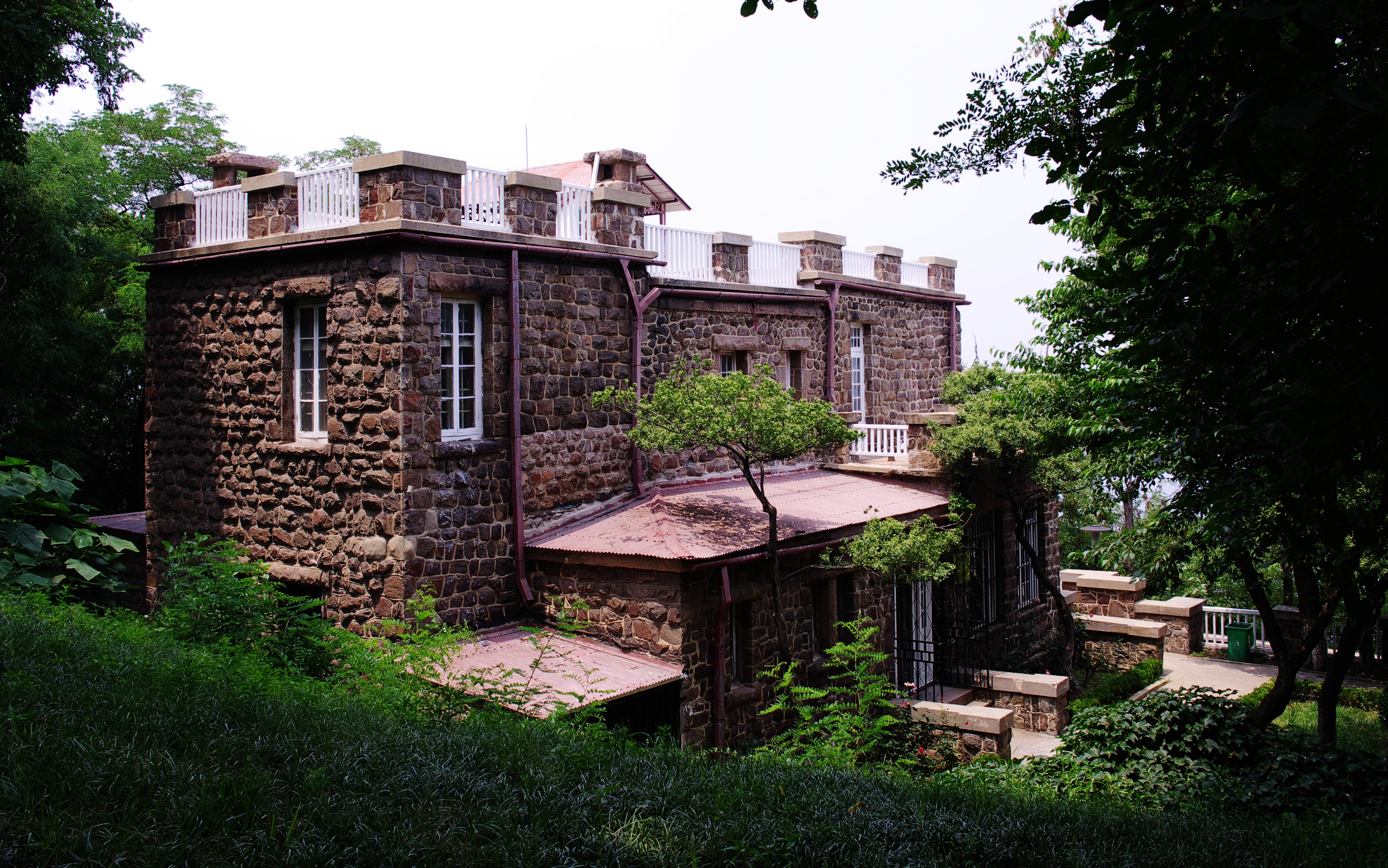 中文（中国大陆）: 丹麥領事館，煙台，山東